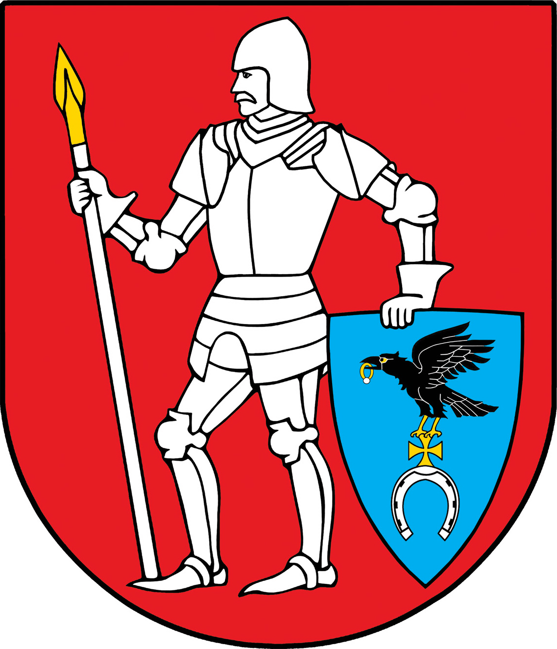 Herb gminy Kulesze Kościelne